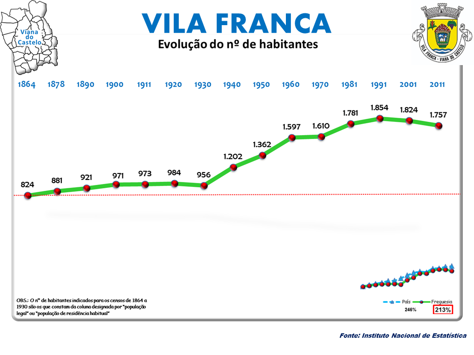 Censos 1864/2011